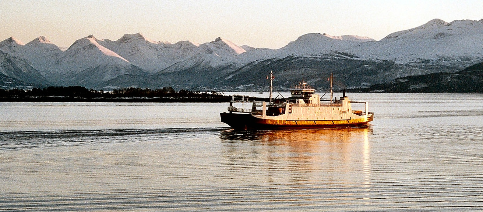 Eind februari Romsdalsfjord gezien vanuit de haven van Molde